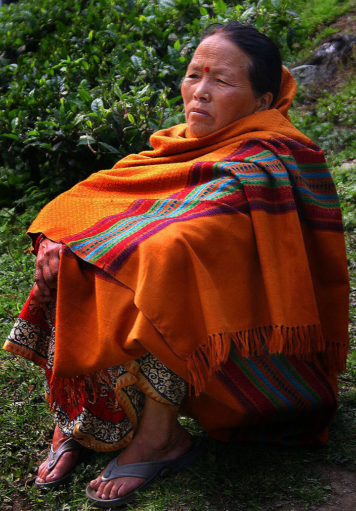 Darjeeling - India